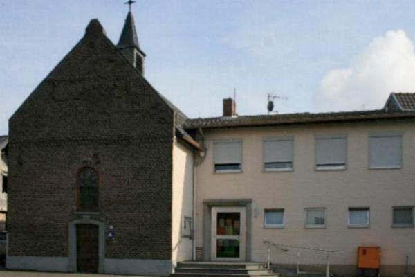 Denkmal Nr. 50 in Geilenkirchen-Teveren